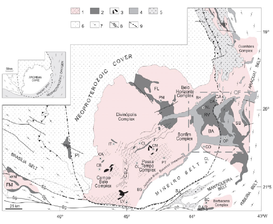 Imagem modificada. Complexos Divinópolis, Belo Horizonte, Bonfim, Passa Tempo, Campo Belo, Bação (BA), Caeté (CA), Santa Bárbara (SB). 1= Crosta Arqueana; 2= Greenstone belts Arqueanos: RV (Supergrupo Rio das Velhas), RP (Rio Paraúna), PI (Piumhi), FM (Fortaleza de Minas), BAR (Barbacena); 3= Complexos máficos-ultramáficos; 4=Supergrupo Minas; 5= Supergrupo Espinhaço; 6= Grupo Bambuí; 7= Estruturas Neoproterozóicas; 8= Falhas; 9= Limíte do Cráton do São Francisco. CSZ = Zona de Cisalhamento Cláudio.